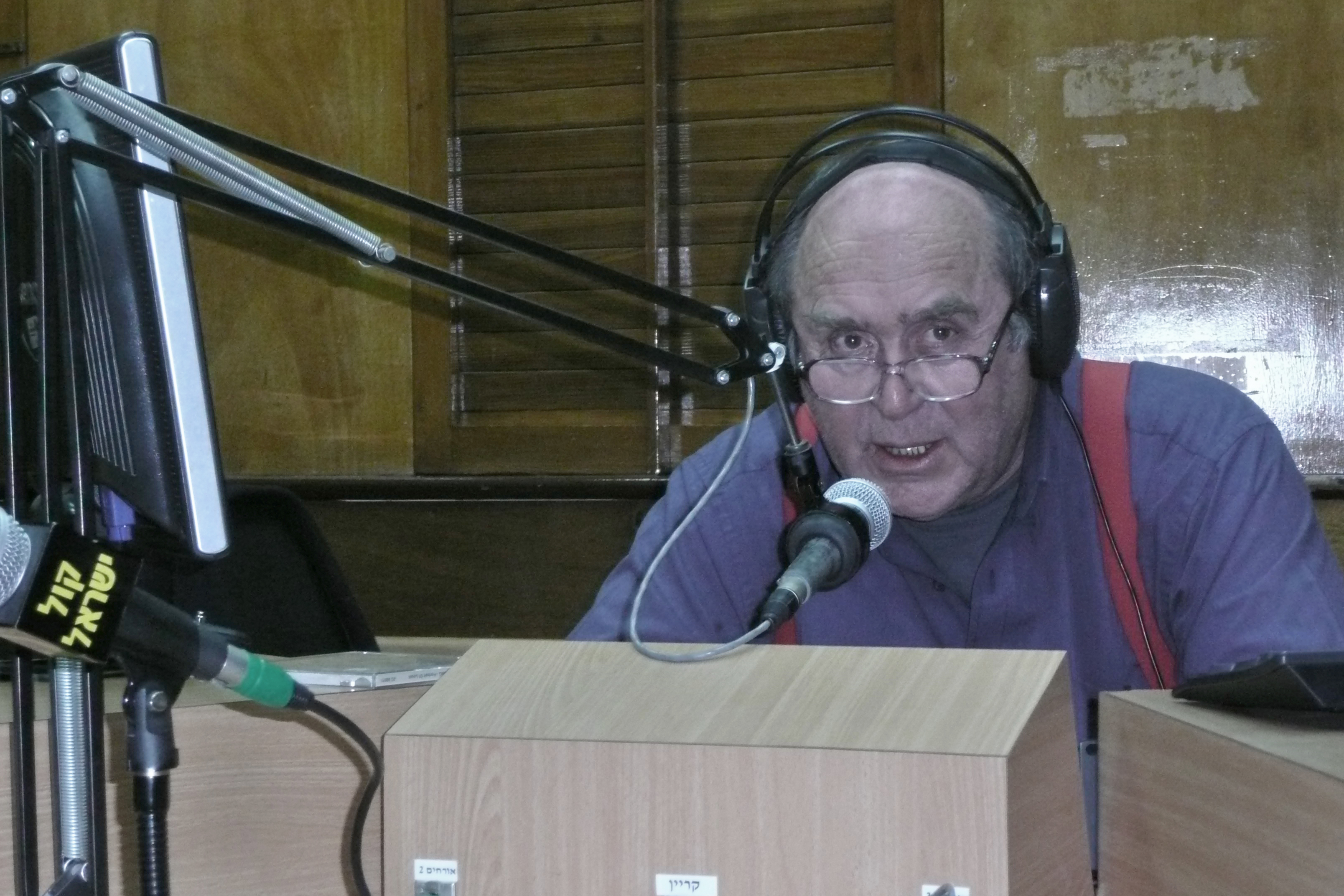 יצחק נוי מגיש את תכניתו "שבת עולמית" ברשת ב' של קול ישראל